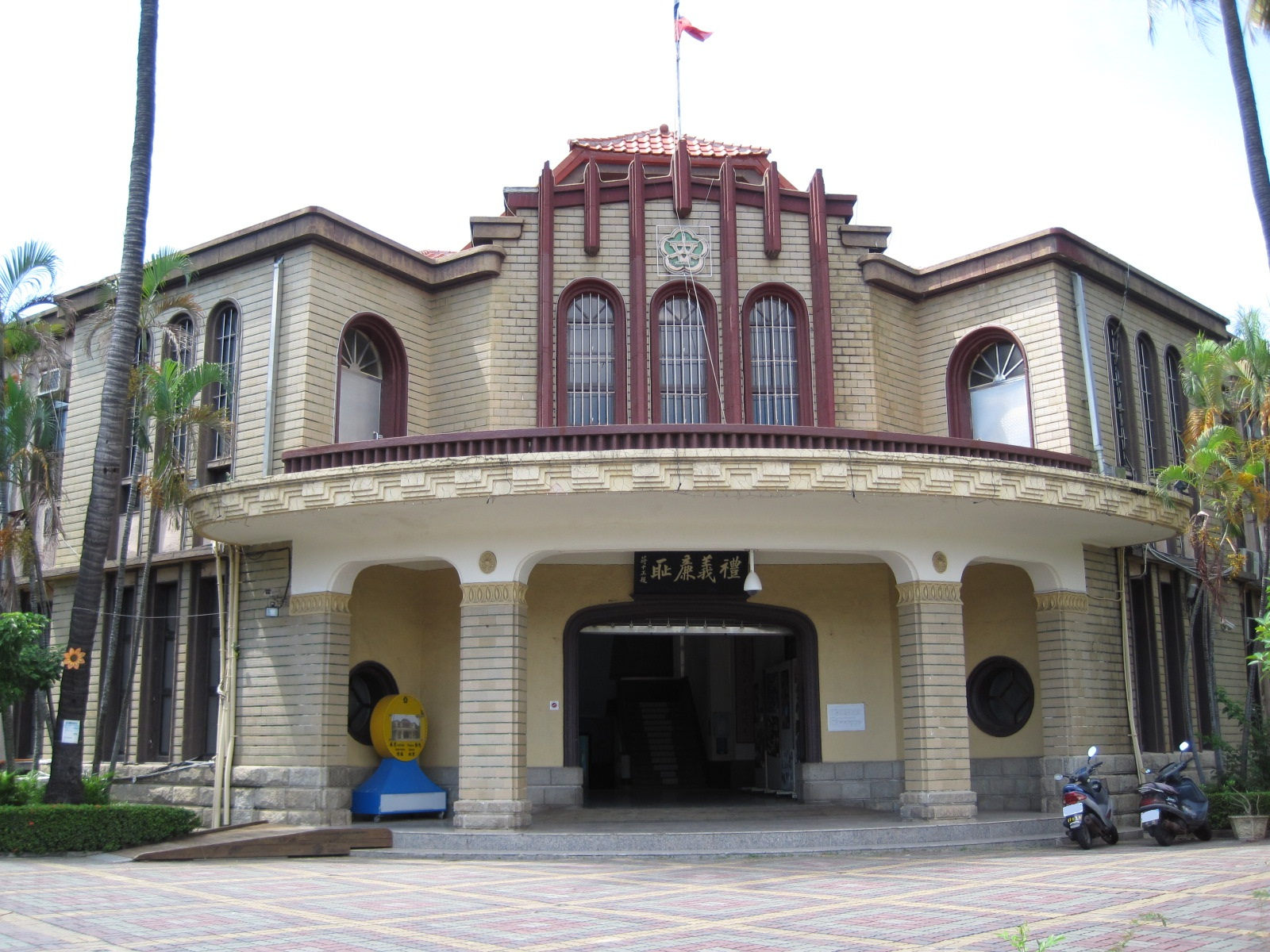 原寶公學校本館，現為立人國小的忠孝樓。